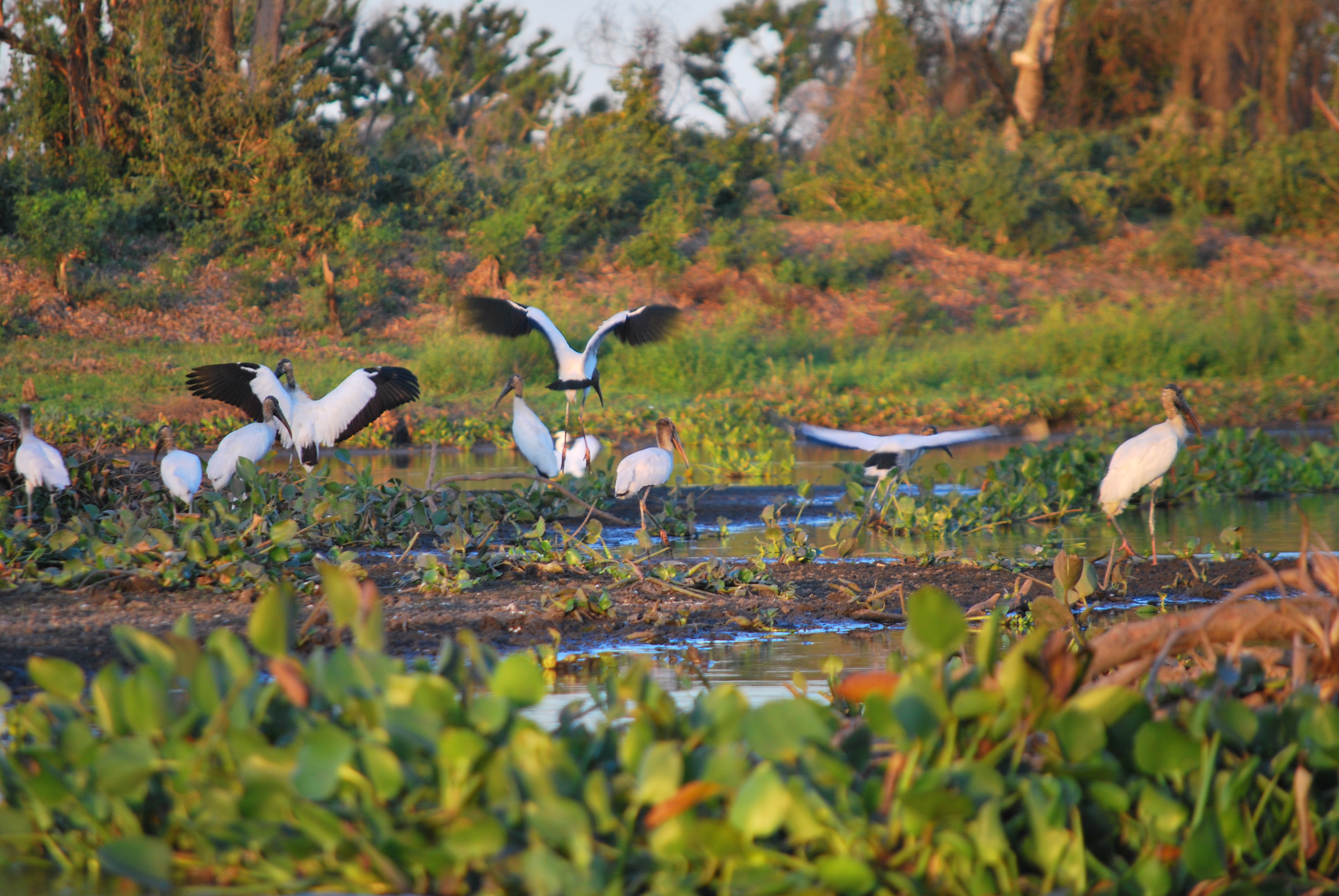 Pantanal